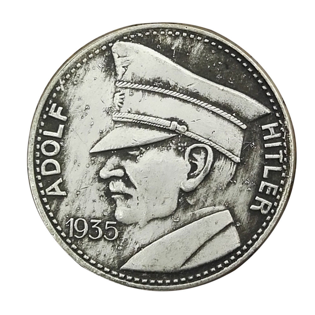 Gedenkmünze von A.H. aus dem Jahr 1935.